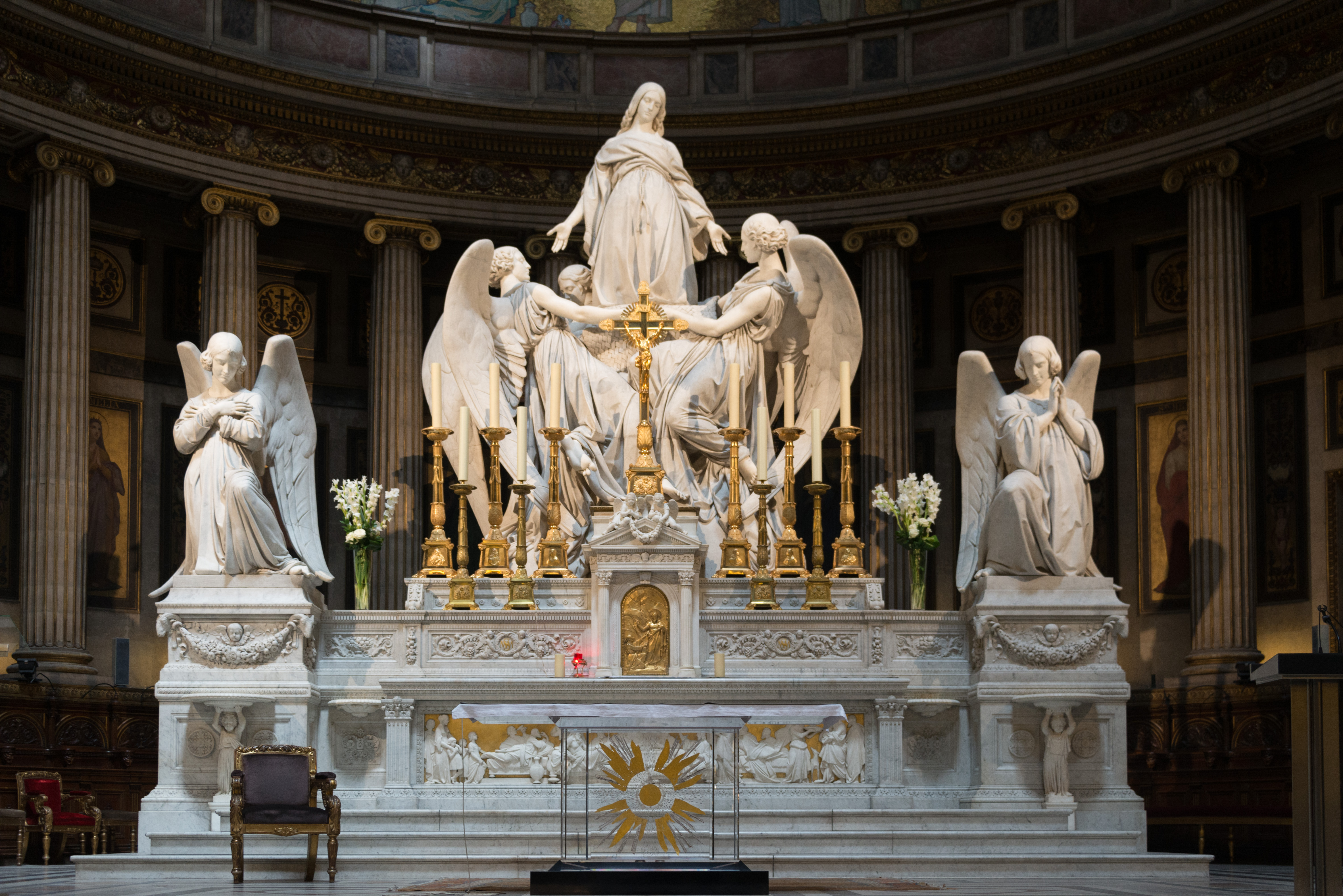 57046-Paris